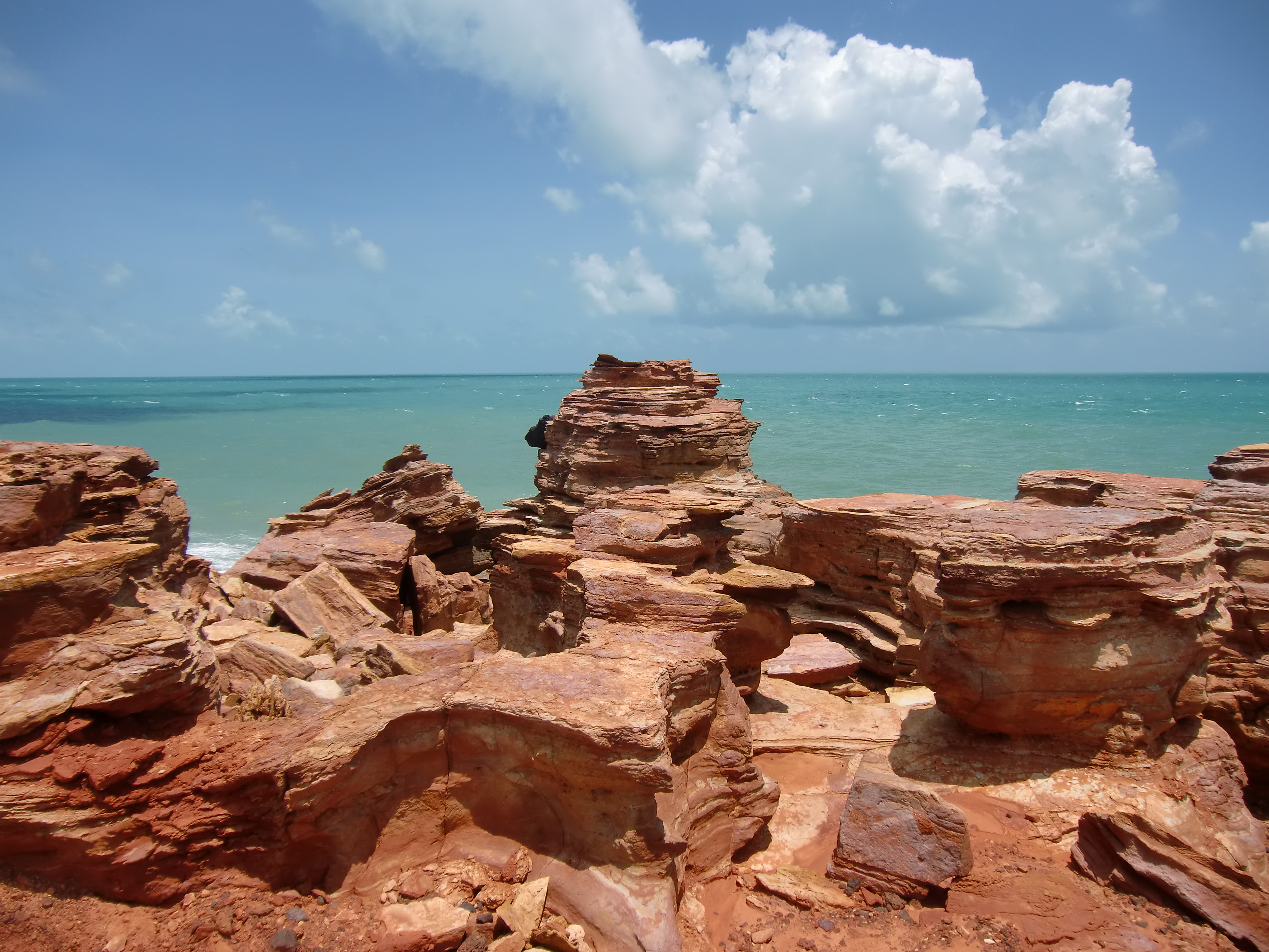 Vue de Gantheaume Point, Broome (Australie occidentale)